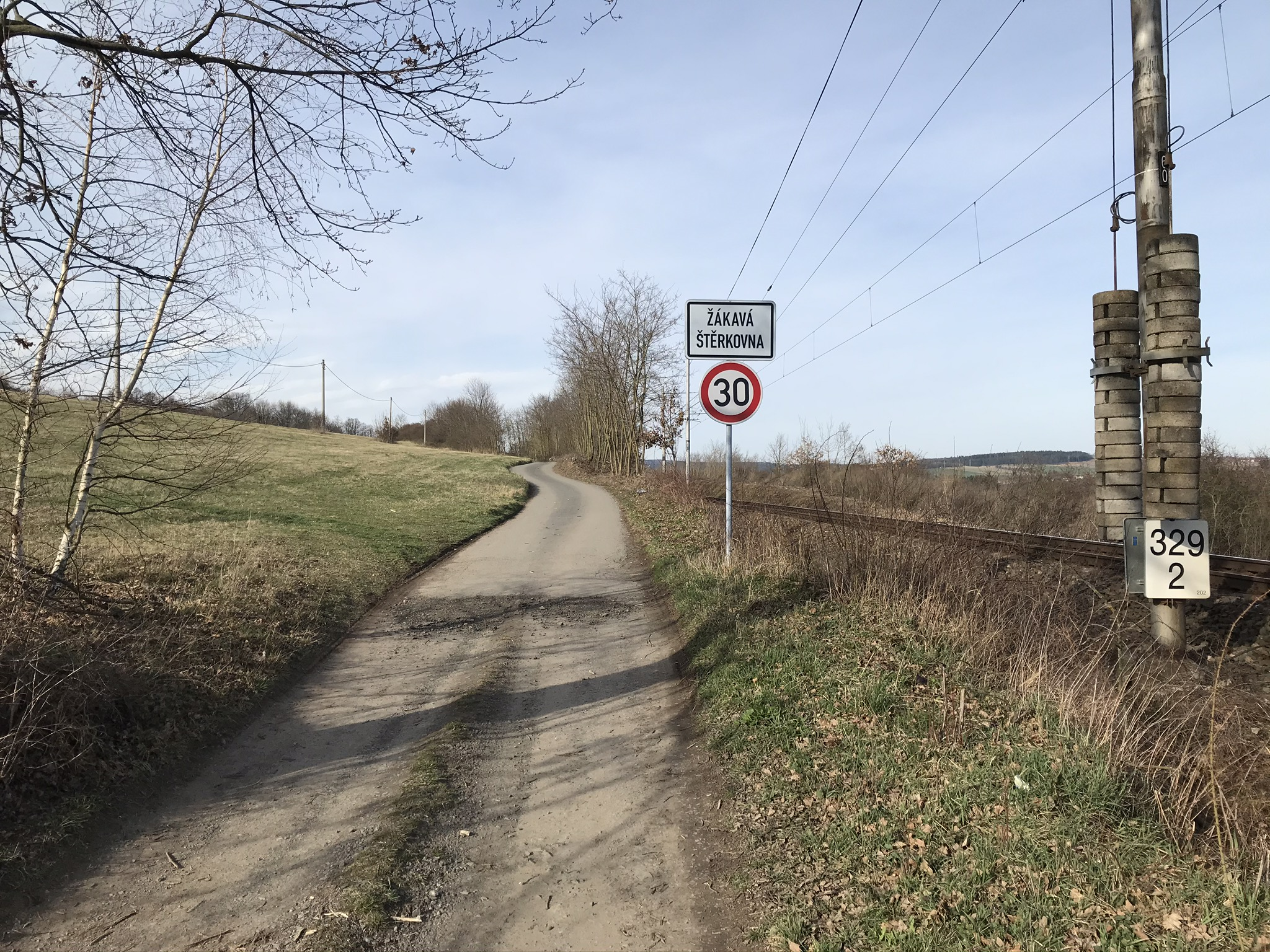 Vjezd do osady Štěrkovna u Žákavé směrem od Zdemyslic